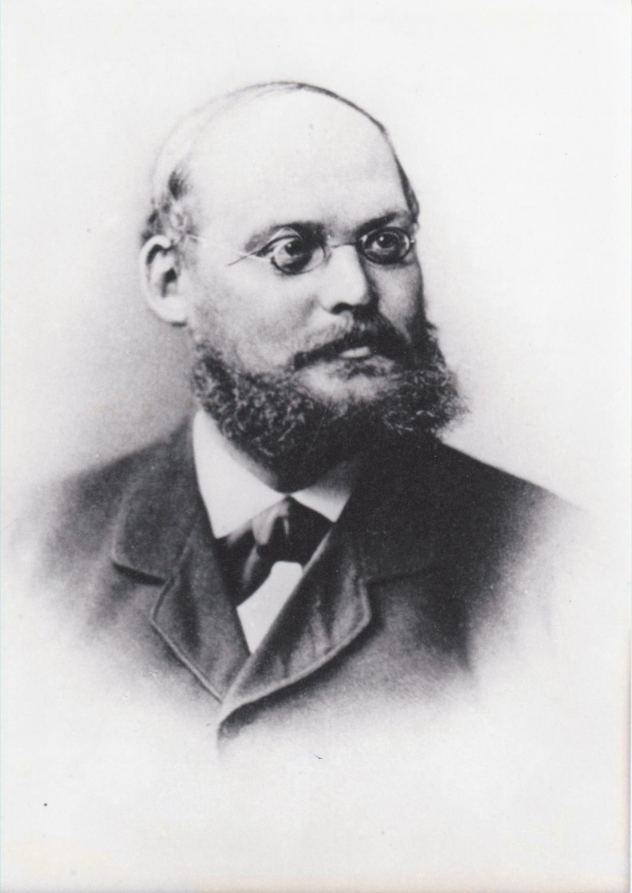 Prof.Wilhelm Barnim Dames